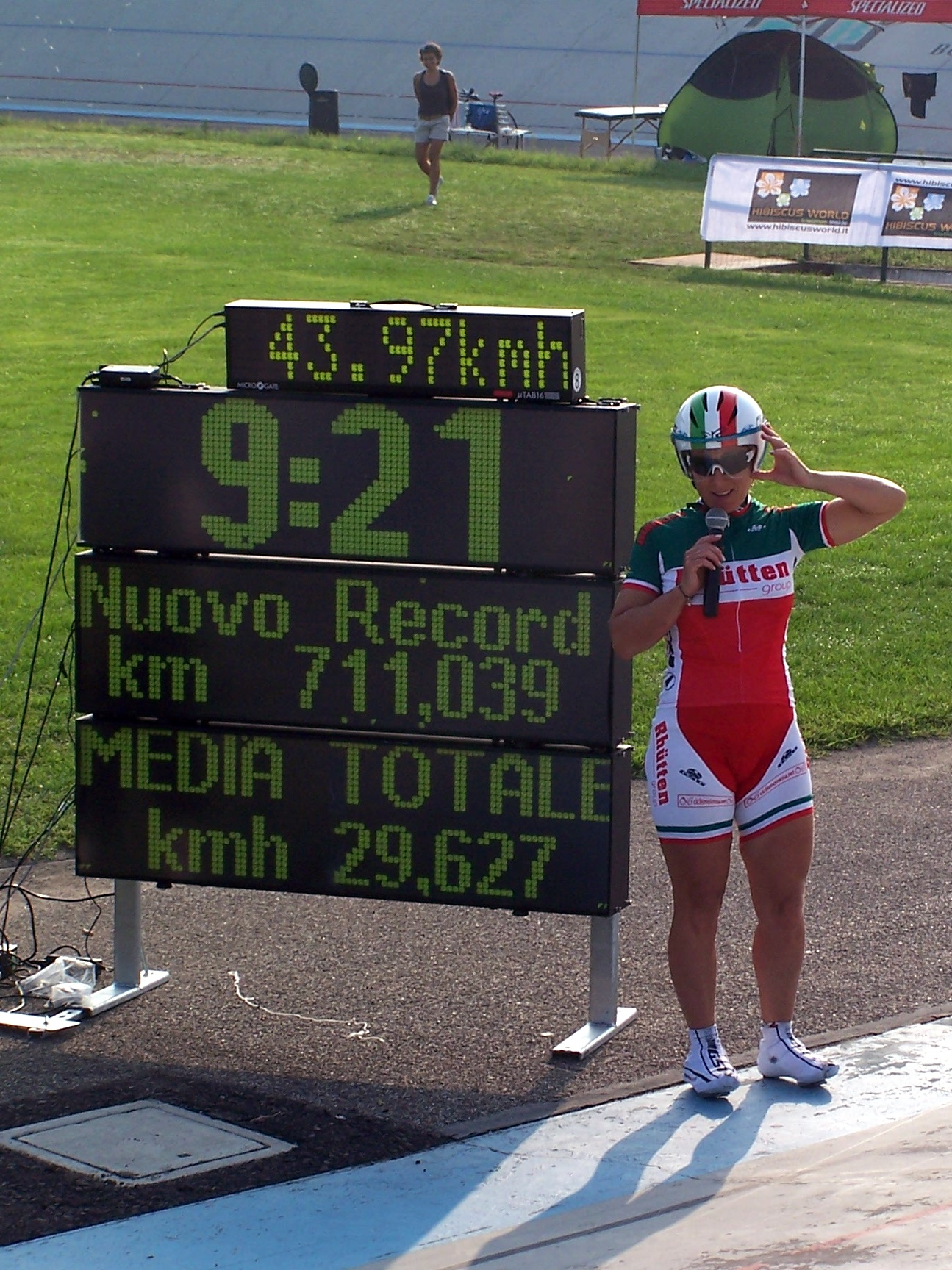 10-11 settembre 2011: record mondiale 24h su pista (outdoor track), 711,04 km alla media di 29,63 km/h ad opera della ciclista milanese Anna Mei.